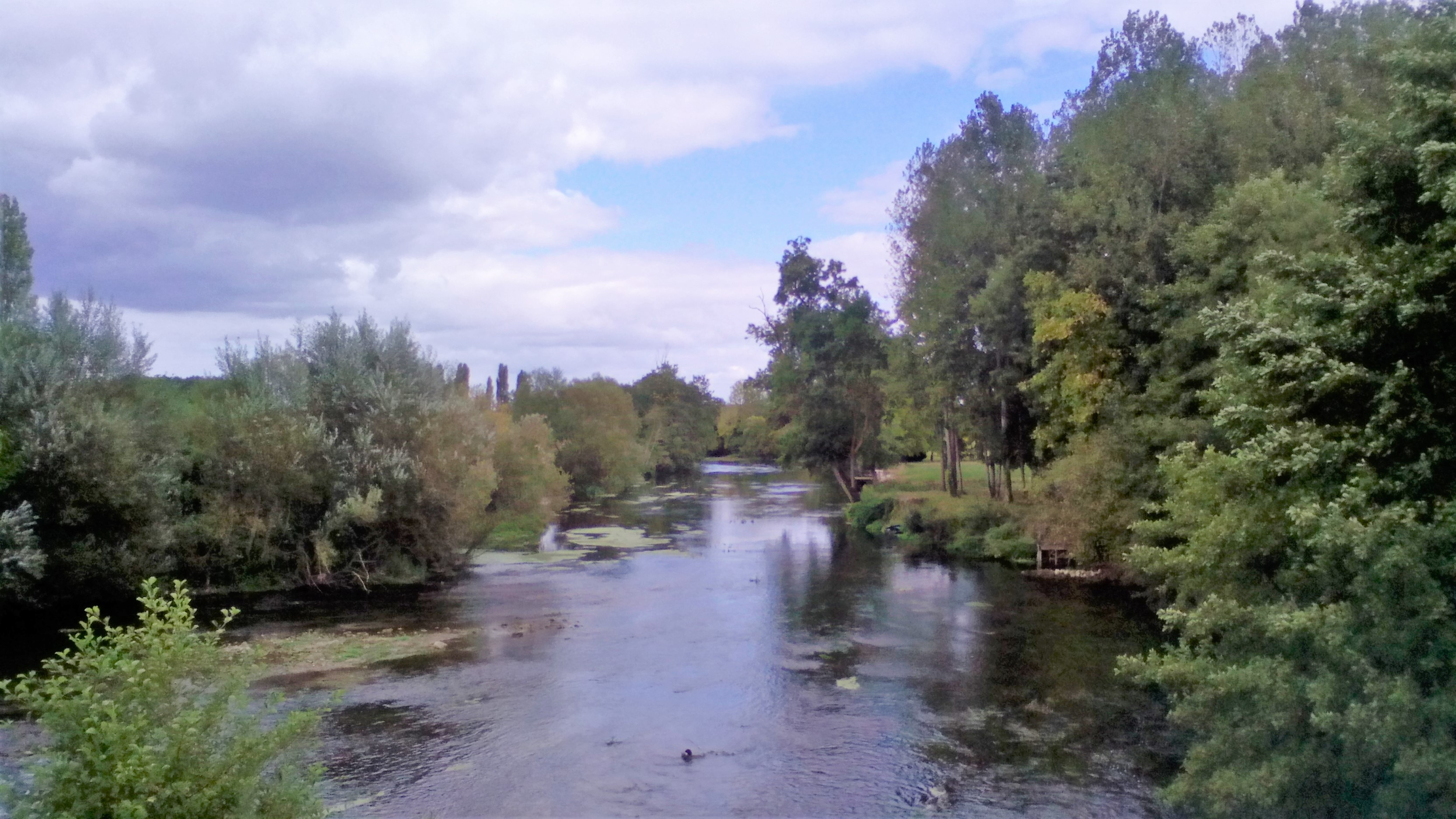 Le Clain entre Beaumont et Saint-Cyr sur la commune de Beaumont-Saint-Cyr